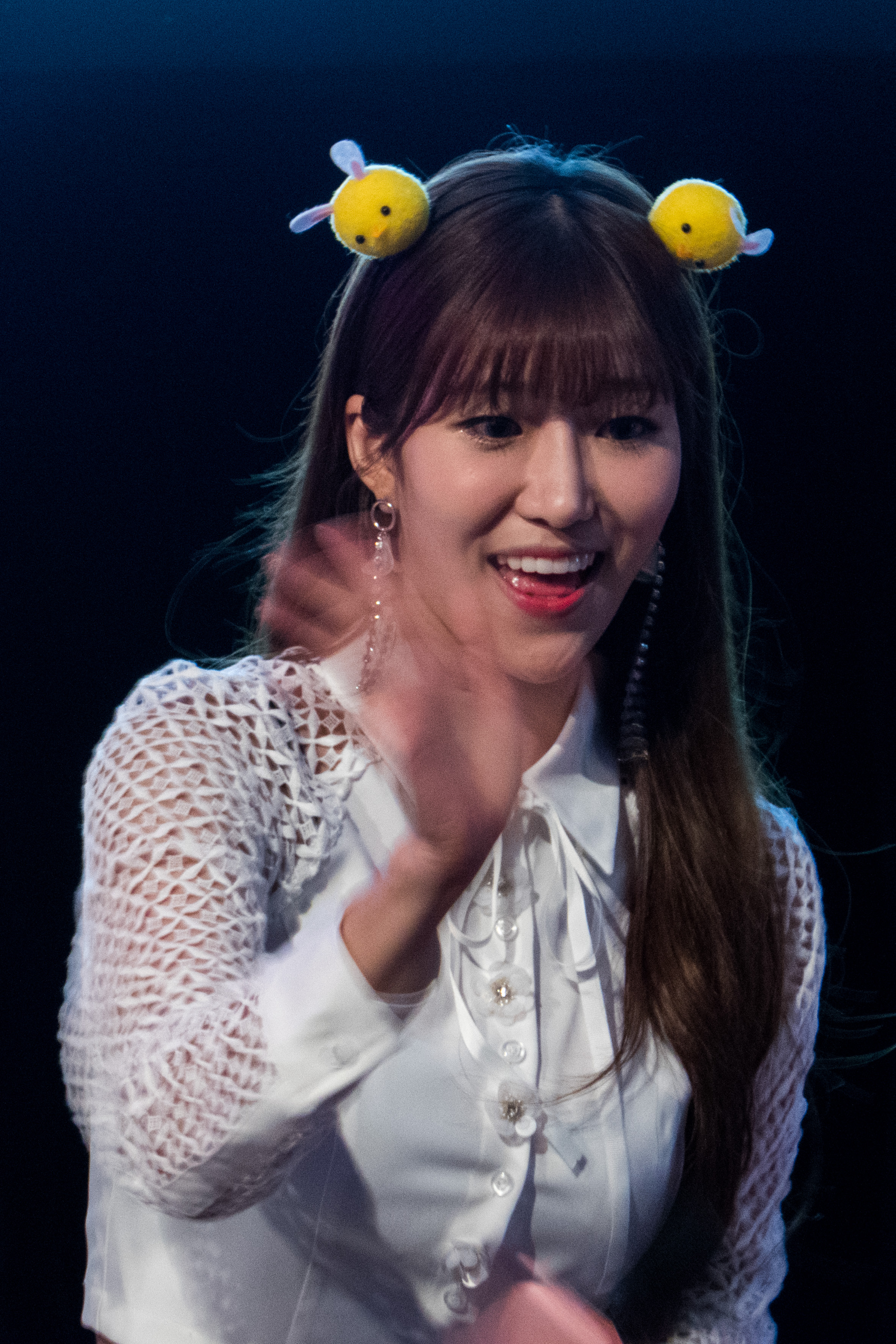 WJSN/Cosmic Girls